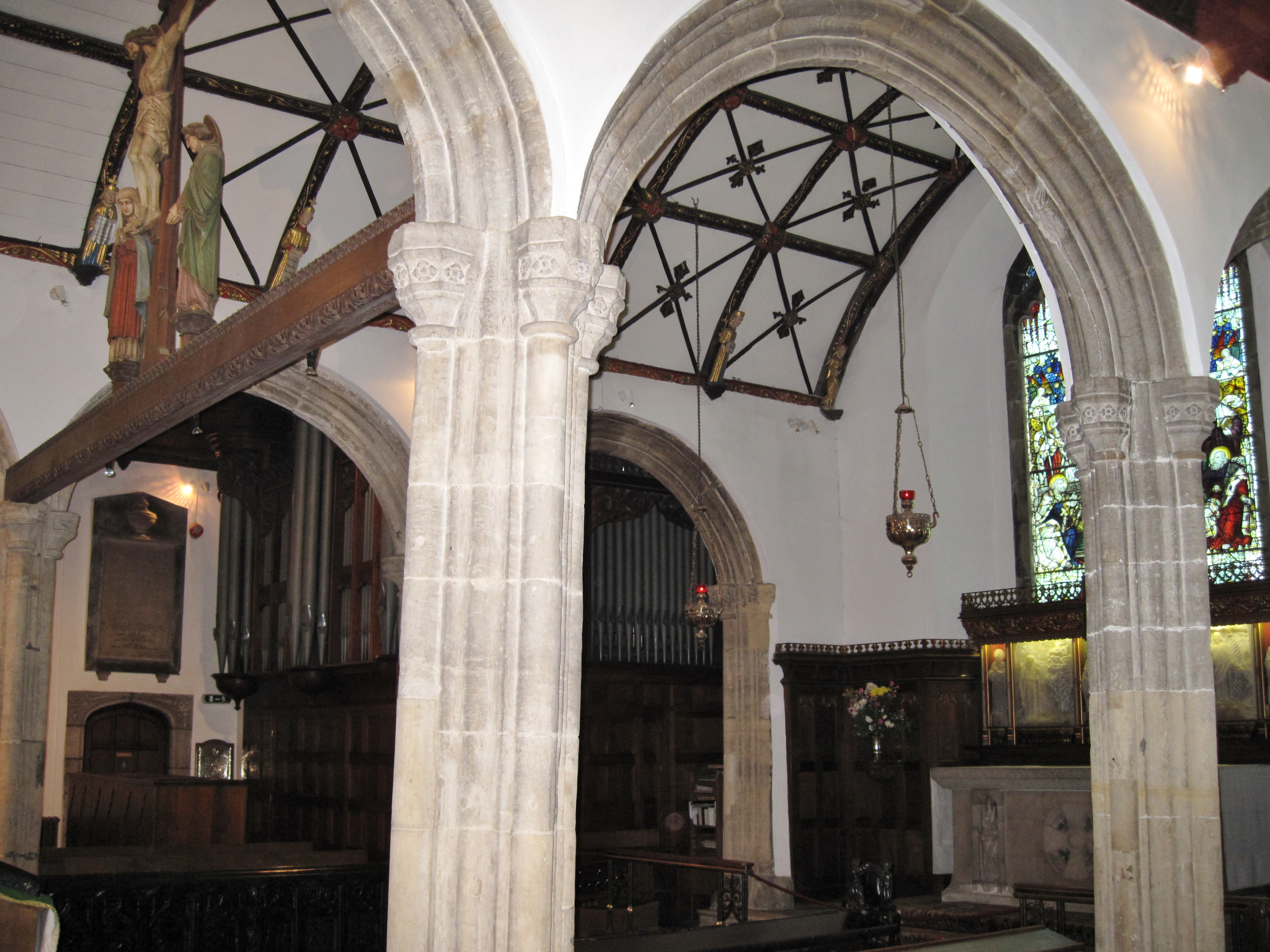 Innenraum der Gemeindekirche von St. Ives, Cornwall, England